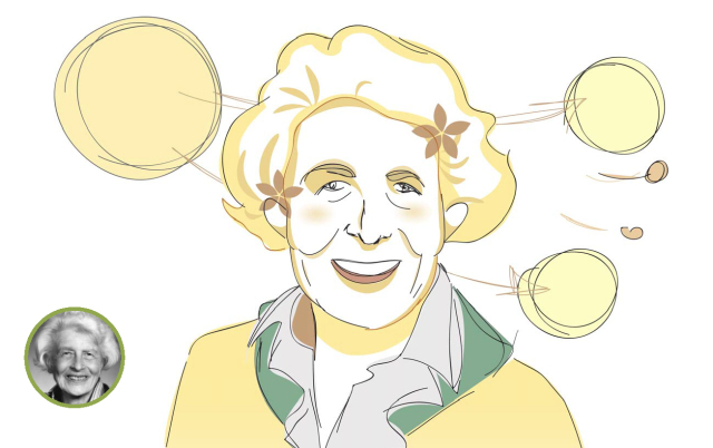 Caricatura de Gertrude Scharff Goldhaber